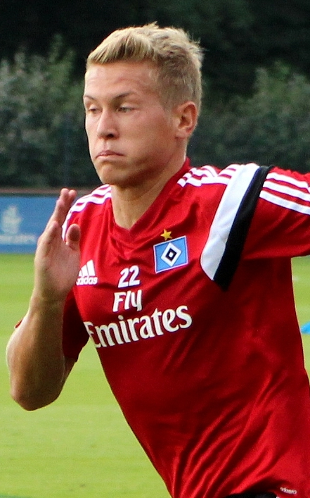 Matthias Ostrzolek beim HSV-Training am 14. August 2014.